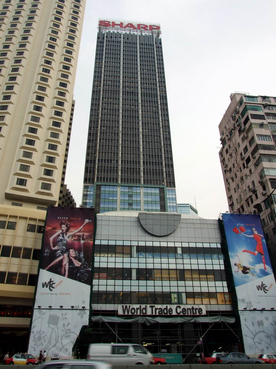 香港世貿中心